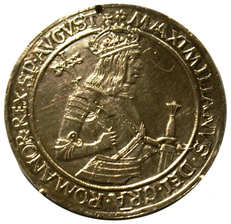 Tirol, Kaiser Maximilian I., Taler, Hall